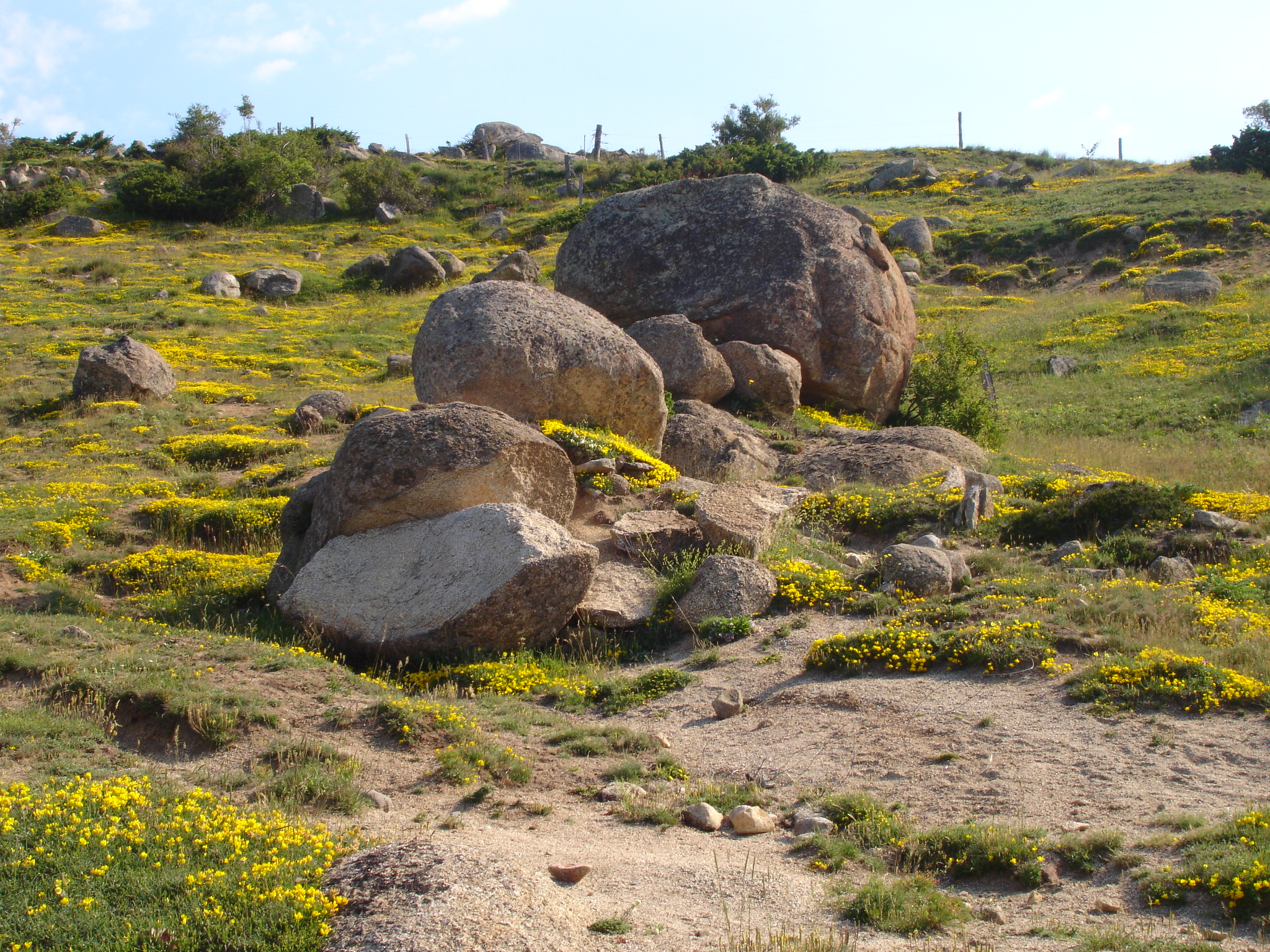 France, Pyrénées-Orientales (66), chaos de Targassonne près de Font-Romeu-Odeillo-Via - chaos granitique